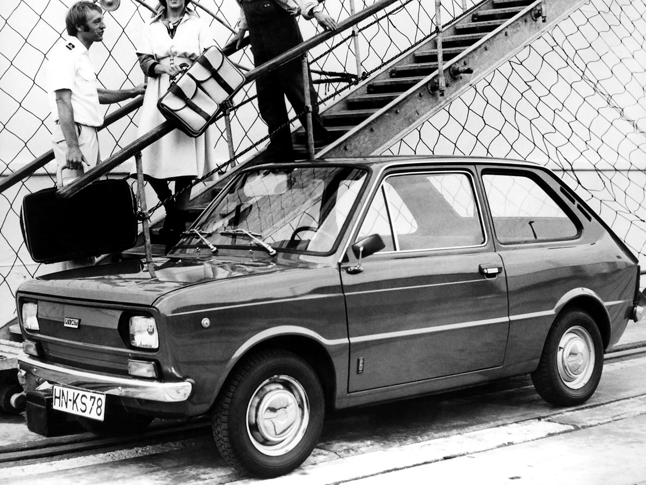 fiat133exp